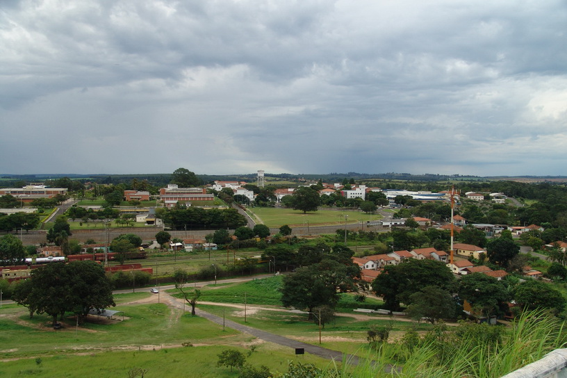 Imagem de Botucatu, estado de São Paulo, Brasil. Bairro do Lajeado e outros.